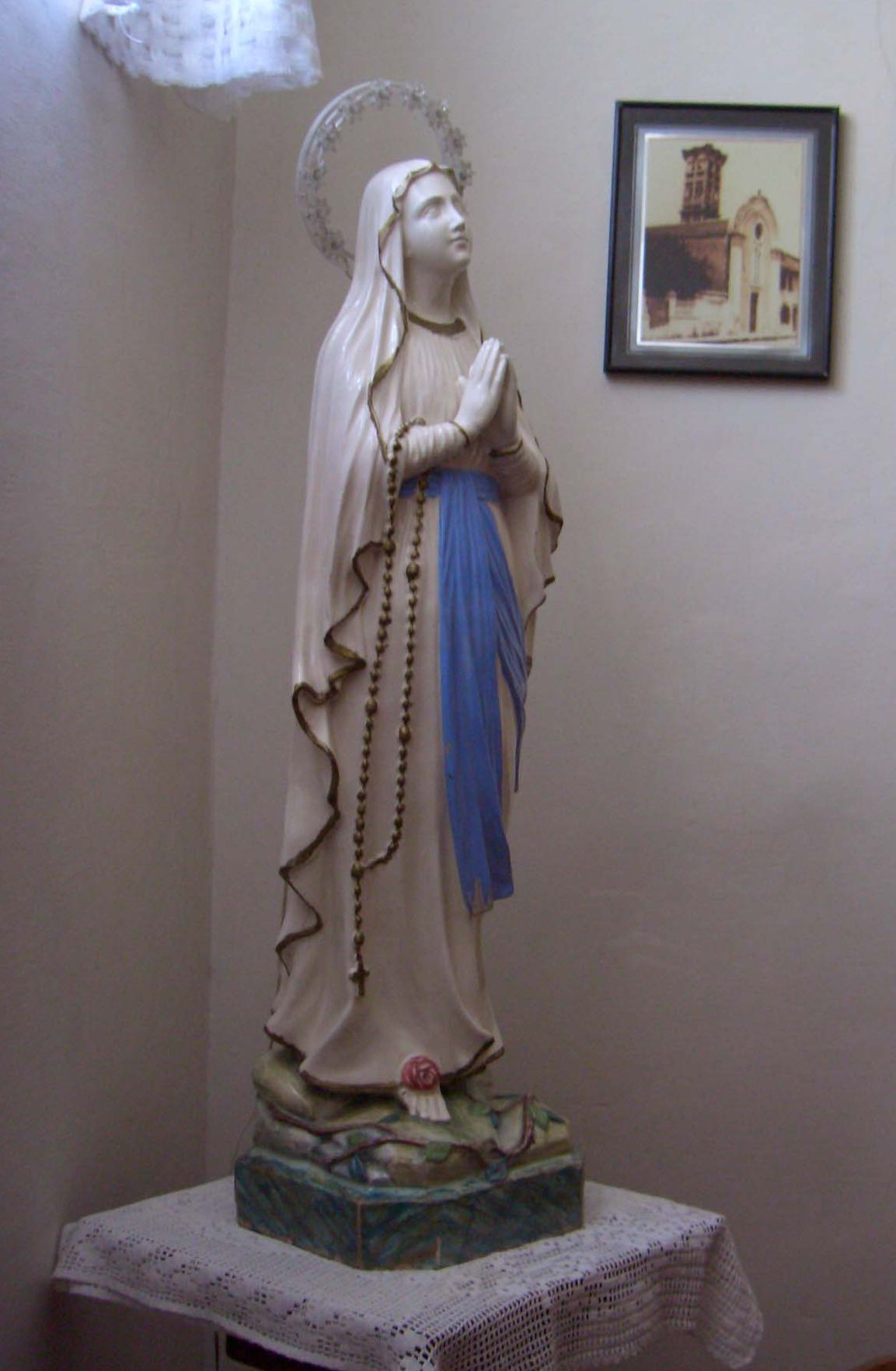 Madonnenfigur aus der katholischen Kirche in Vlora (Albanien). In dieser Heiligenfigur wurden während des kommunistischen Religionsverbots die konsekrierten Hostien versteckt.